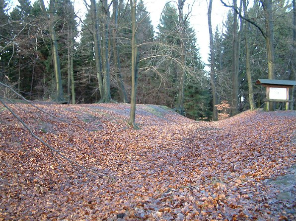 Erdenburg Moitzfeld bei Berg. Gladbach Urheber: Anton (rp) Winter 2003 Nutzungsrechte freigegeben: GNU Free Documentation License.